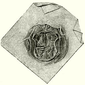 MÁRKI SÁNDOR DÓSA GYÖRGY 1470-1514 A MAGYAR TUDOMÁNYOS AKADÉMIA SEGÉLYEZÉSÉVEL KIADJA A MAGYAR TÖRTÉNELMI TÁRSULAT SZERKESZTI DR. DÉZSI LAJOS BUDAPEST AZ ATHENAEUM R.-T. KÖNYVNYOMDÁJA 1913